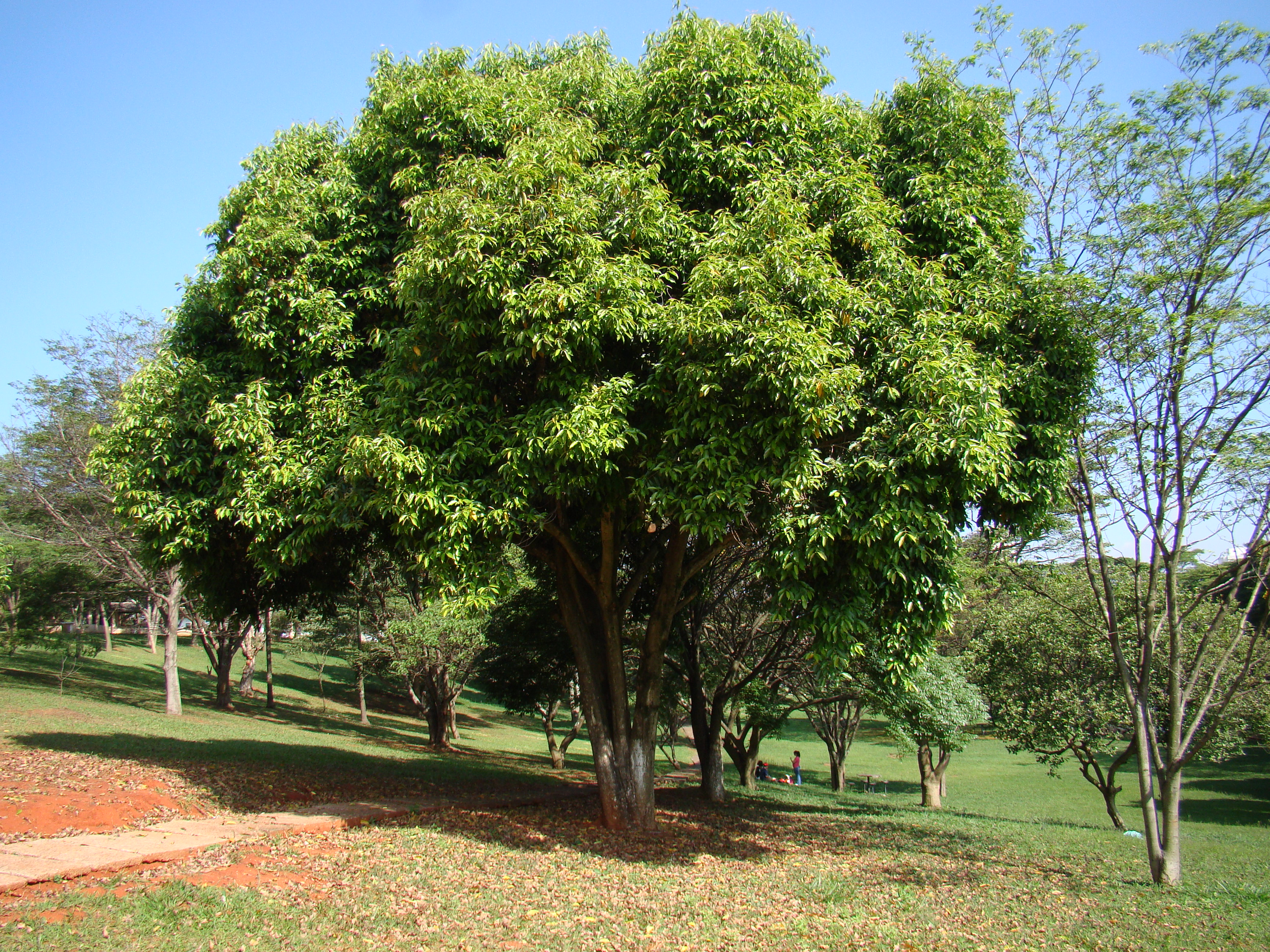 Jambu-de-Java (Syzygium cumini)